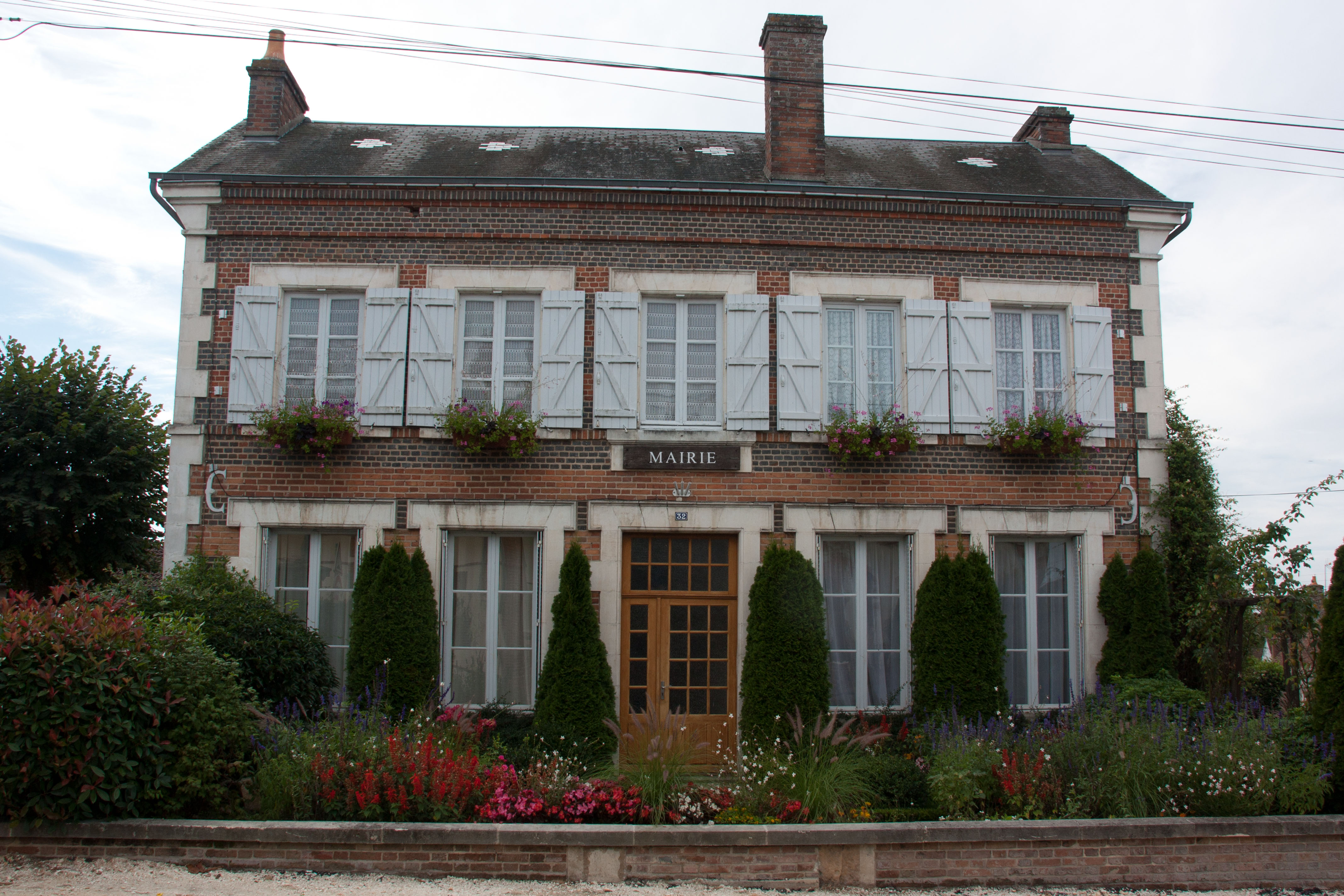 Mairie de Cerdon, Cerdon, Loiret, France.